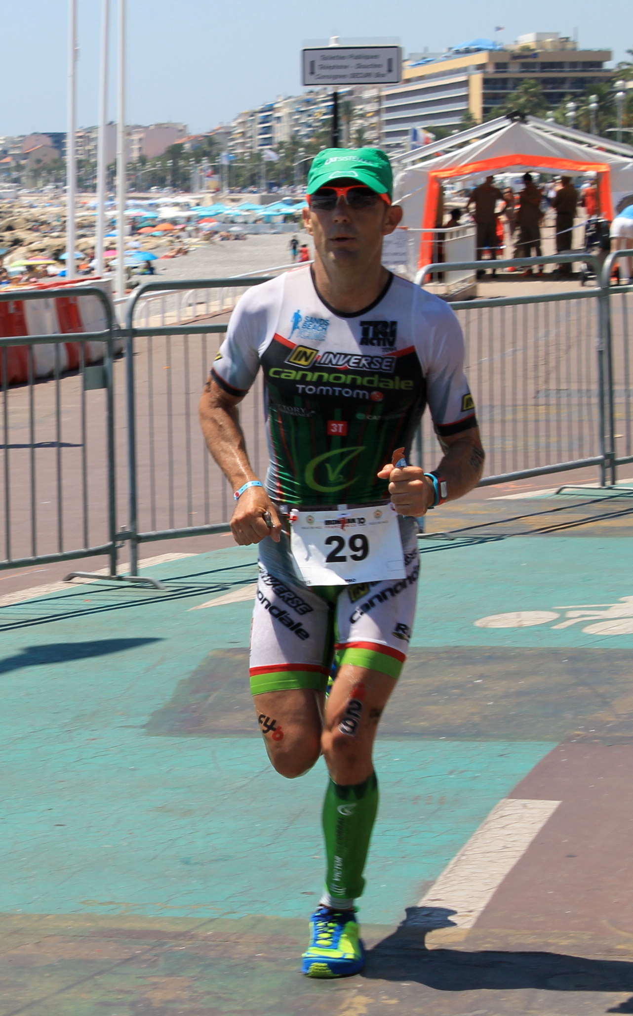 Ironman France . Nice 2015